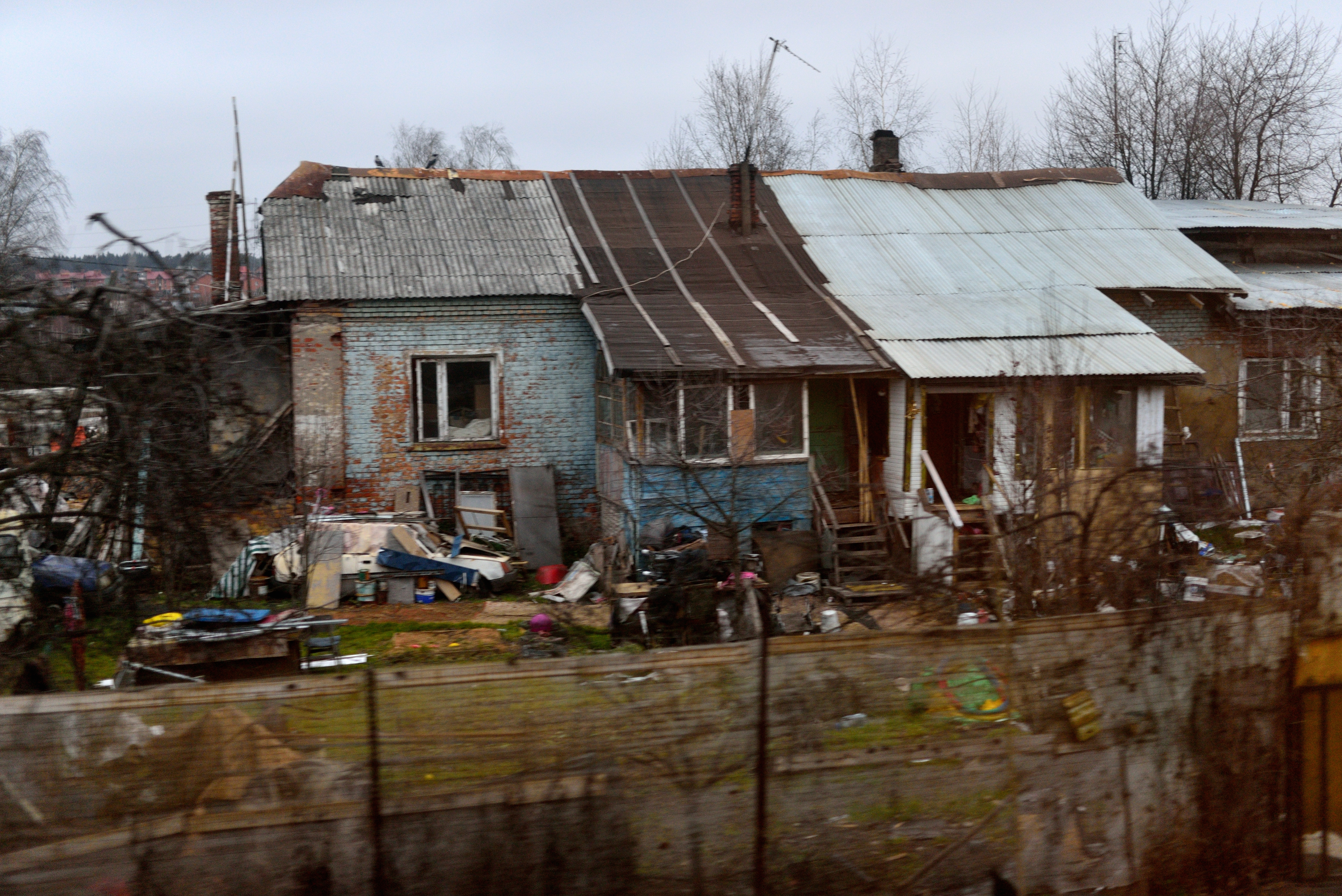 Жилой дом в Кокошкино г Москва